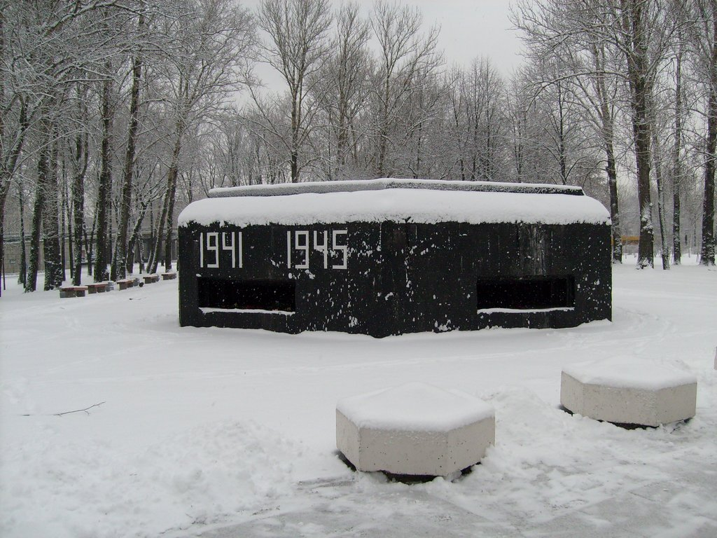 Оборонительное сооружение (ДОТ) на границе блокадного Ленинграда. Проспект Стачек, район Автово